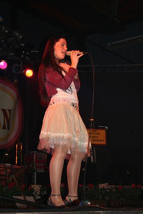 Chantal Live in Kerkdriel!